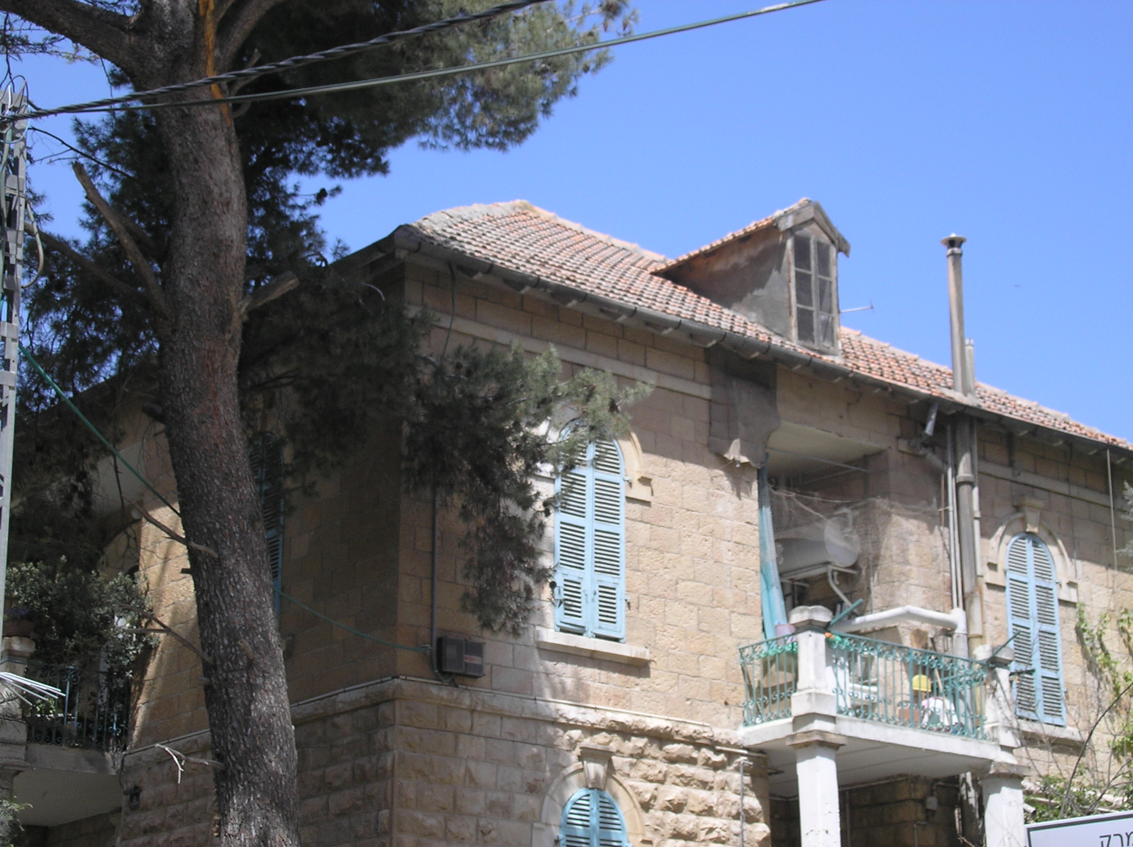 Mughannam apartments next to Beit Mughannam, Talbiya, Jerusalem